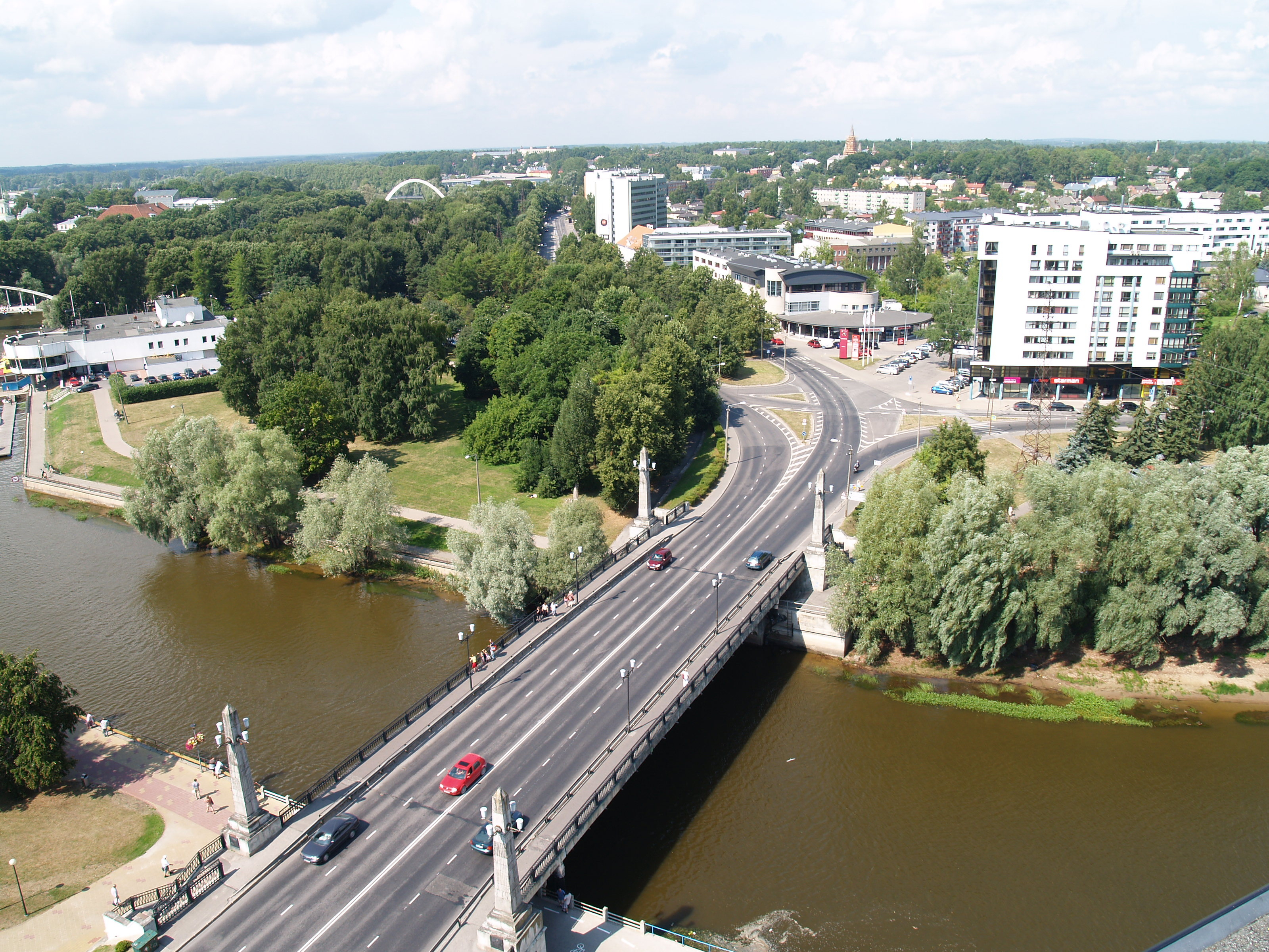 Võidu sild Tartus